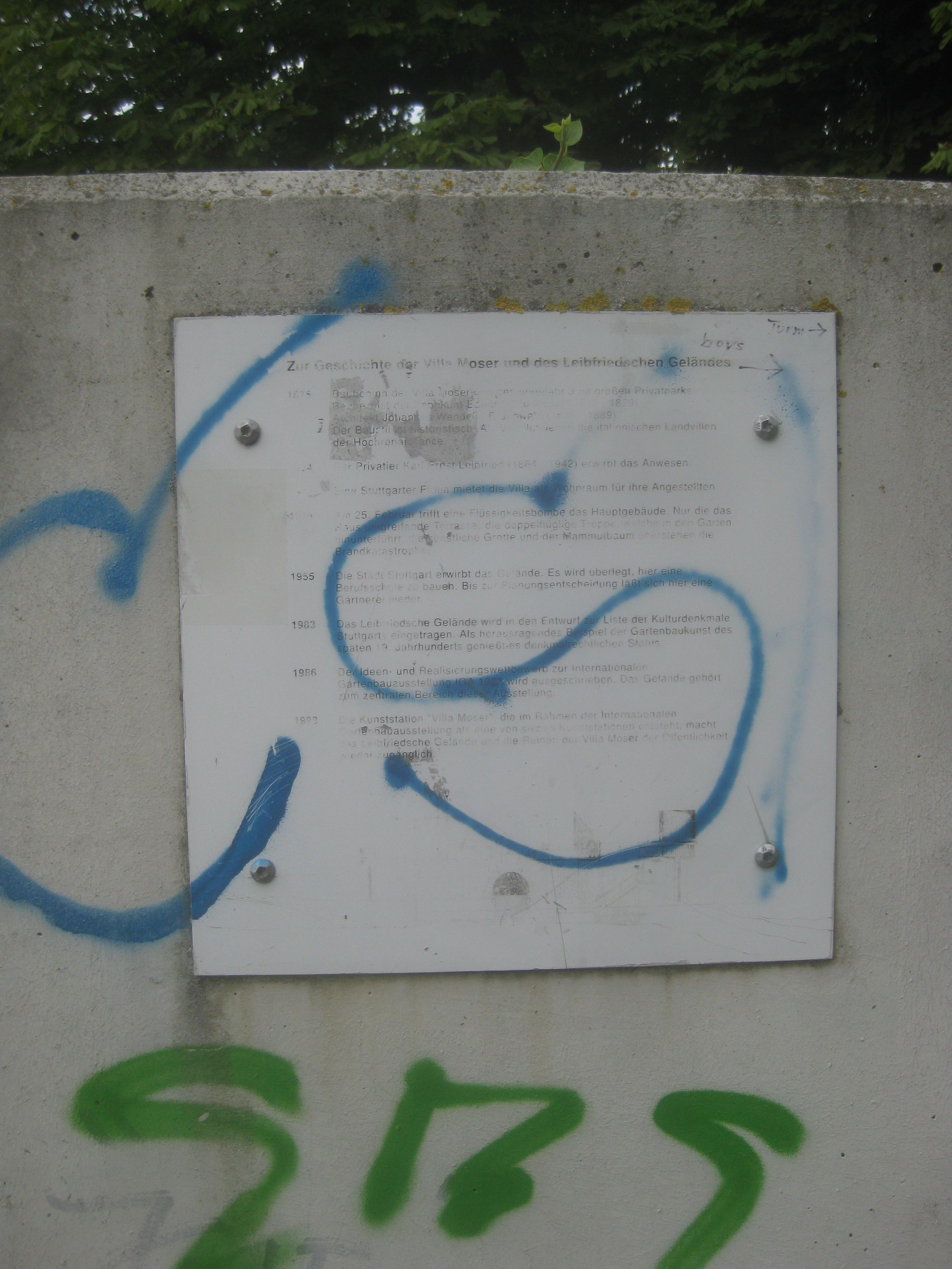 KunststationVilla Moser in Stuttgart, Hinweisschild Geschichte der Villa Moser.